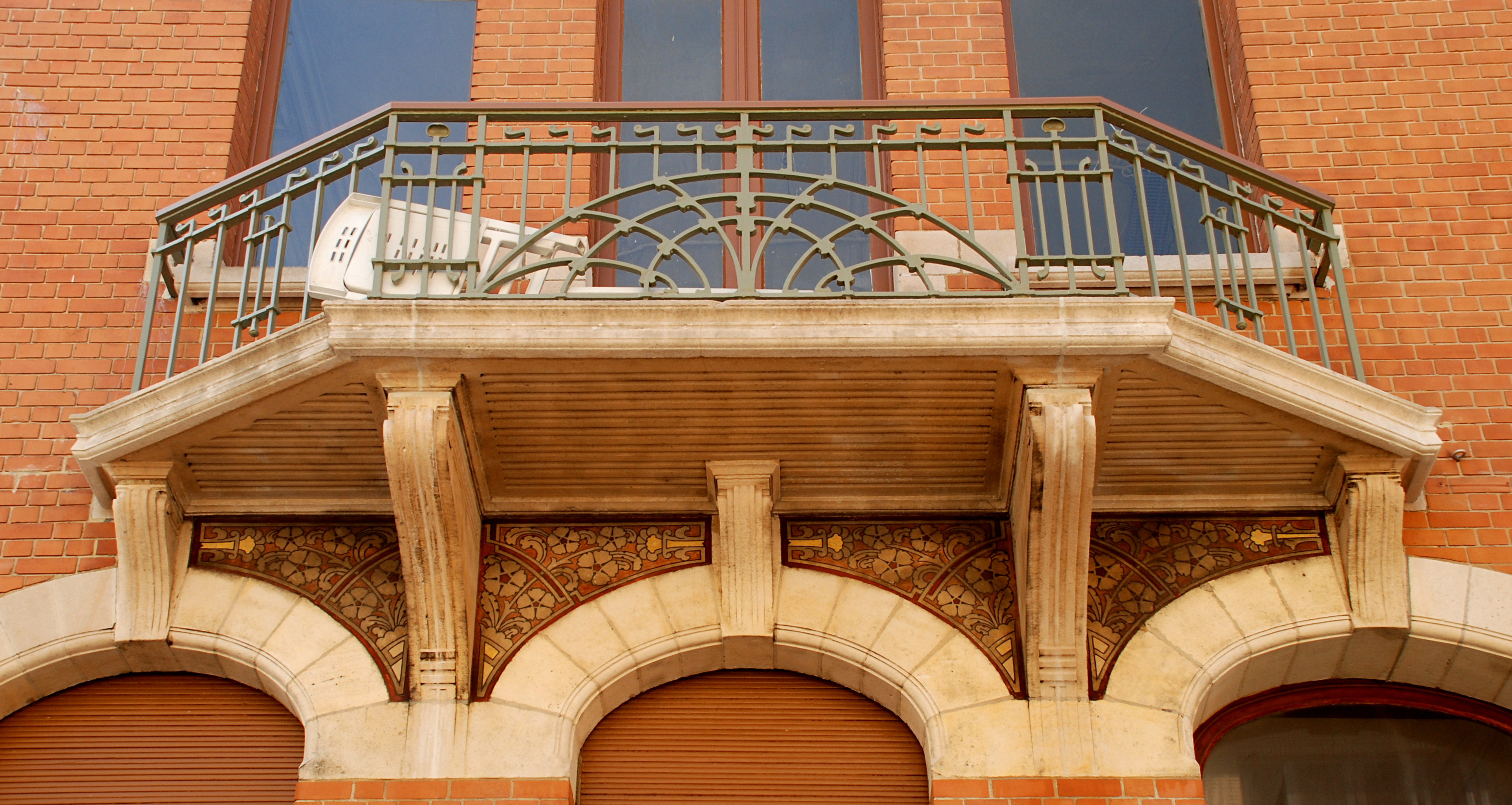 Belgique - Bruxelles - École Rodenbach (Art nouveau - architecte Henri Jacobs - 1905-1911)